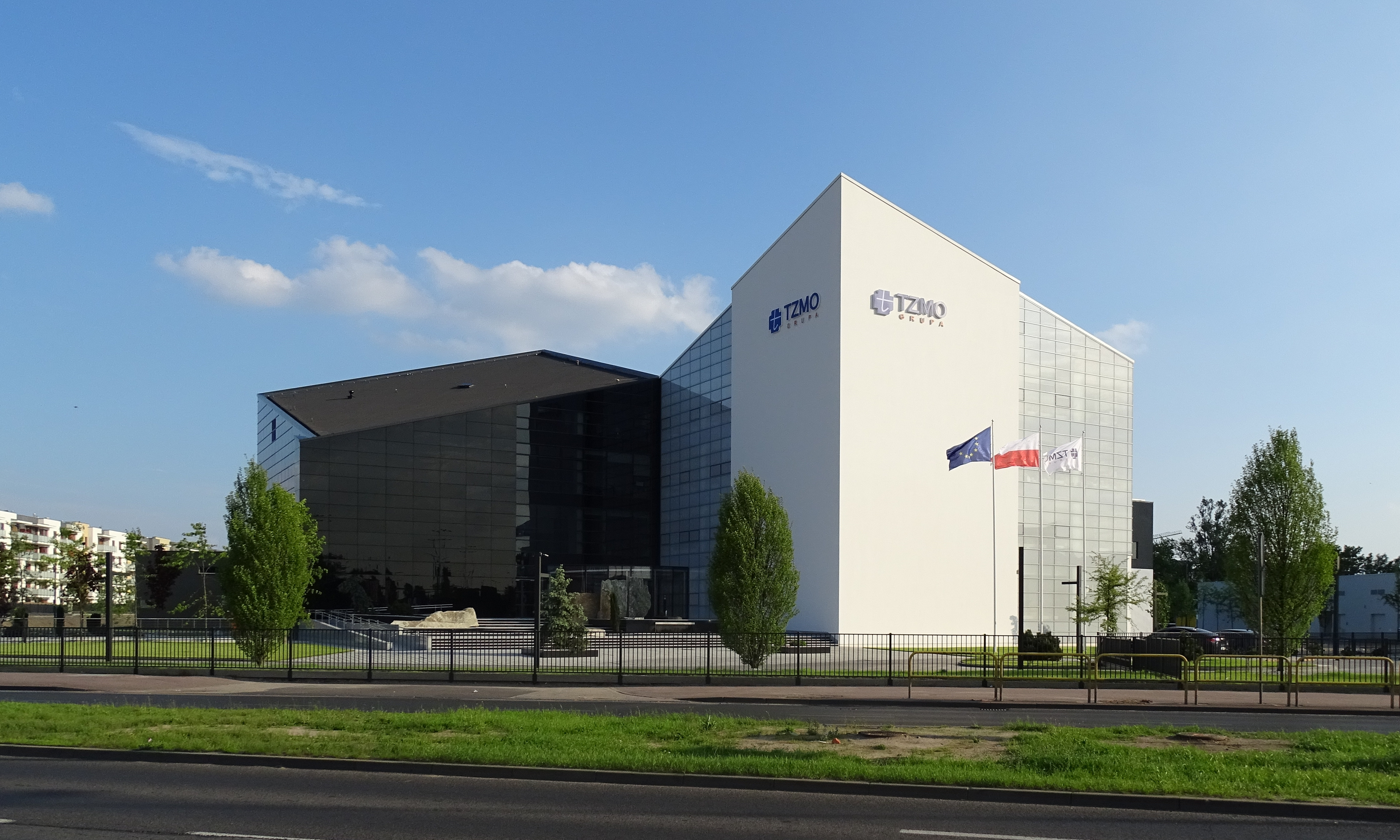 Biurowiec Toruńskich Zakładów Materiałów Opatrunkowych w czerwcu 2019.